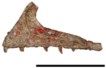 Left maxilla of Noasaurus (PVL 4061; Fundación Miguel Lillo, Tucumán, Argentina). (scales bar: 5 cm)